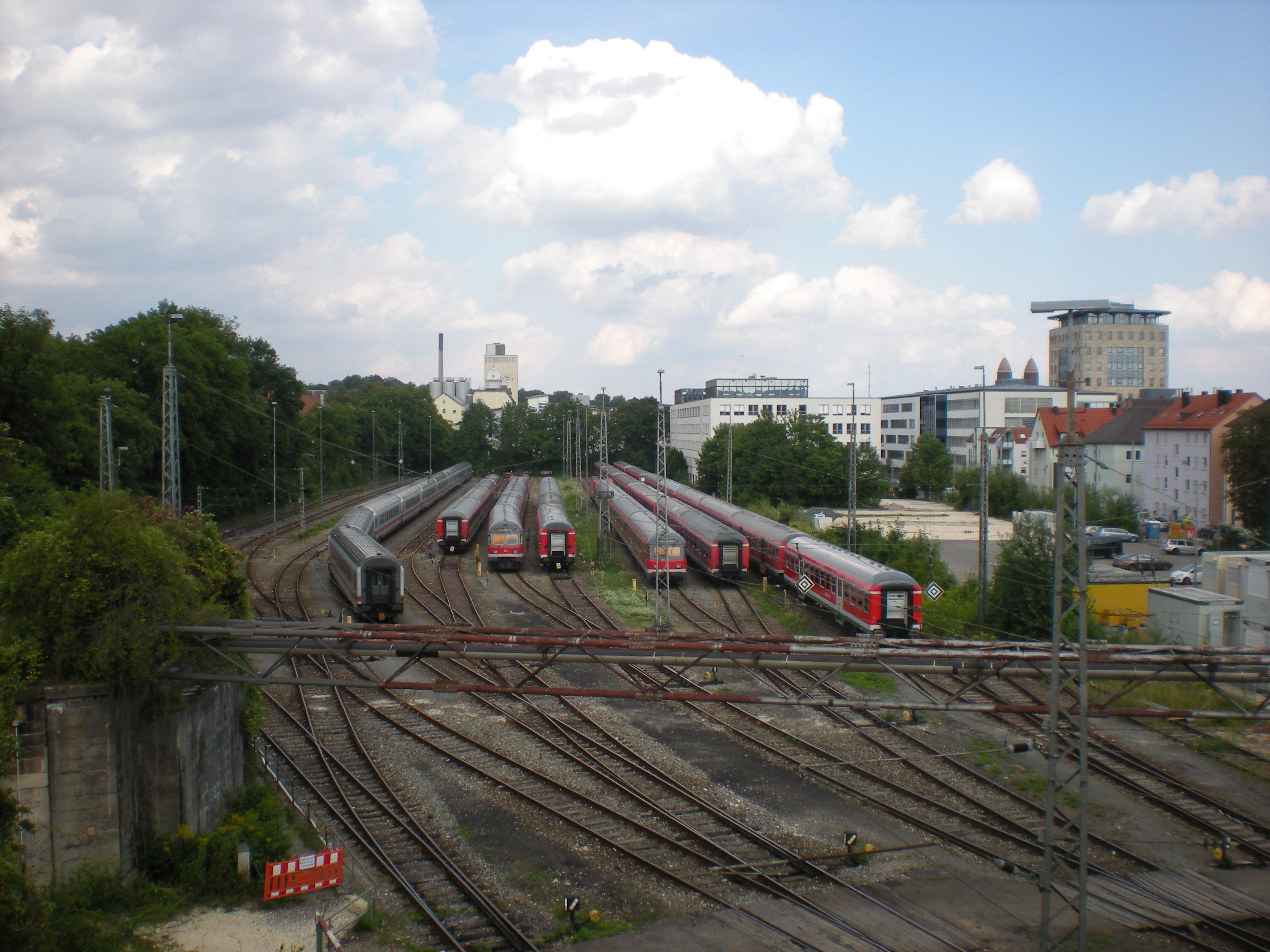 Abstellgruppe Ost des Ulmer Hauptbahnhofs